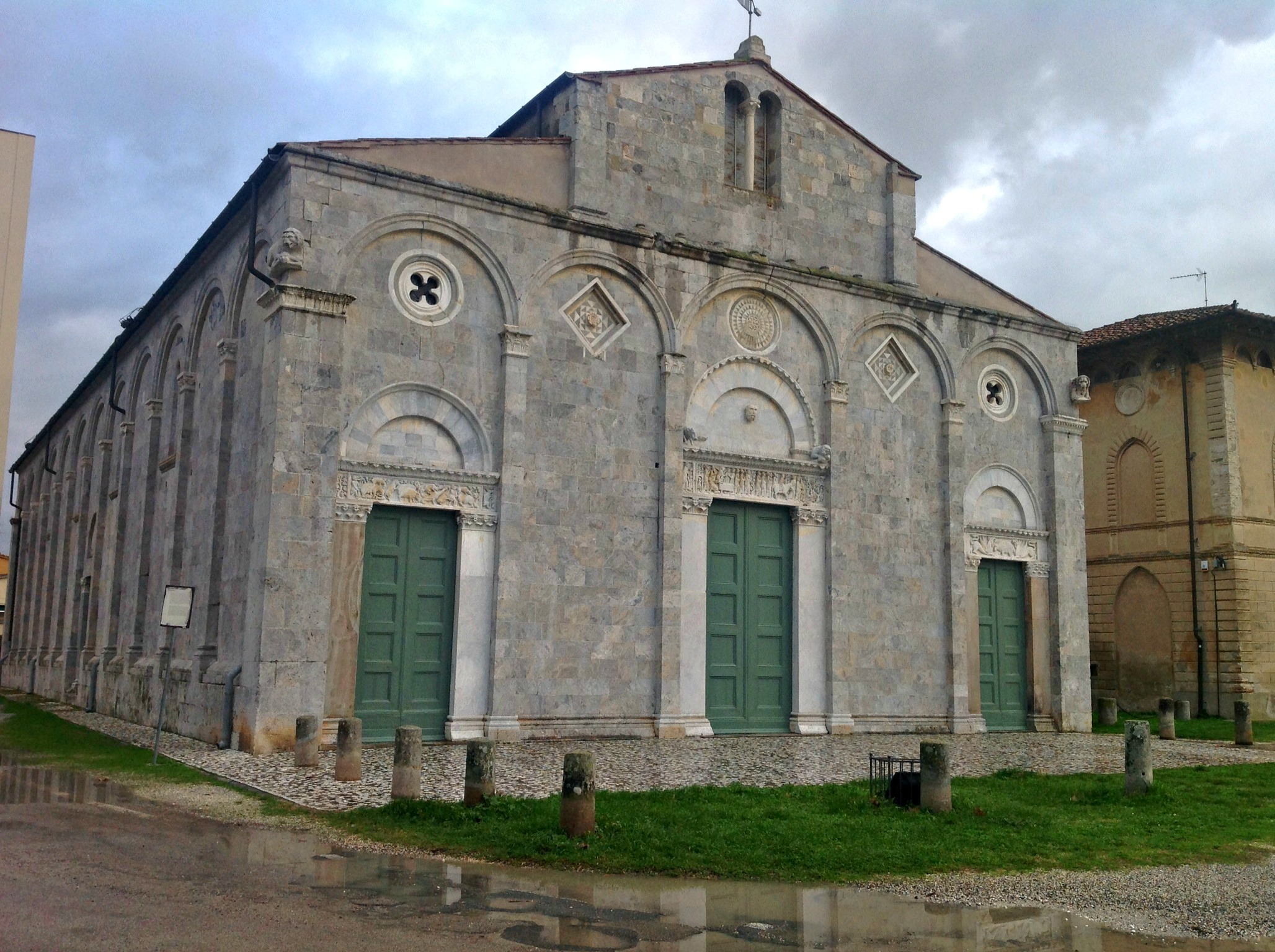 Pieve dei Santi Ippolito e Cassiano (San Casciano a Settimo) esterno